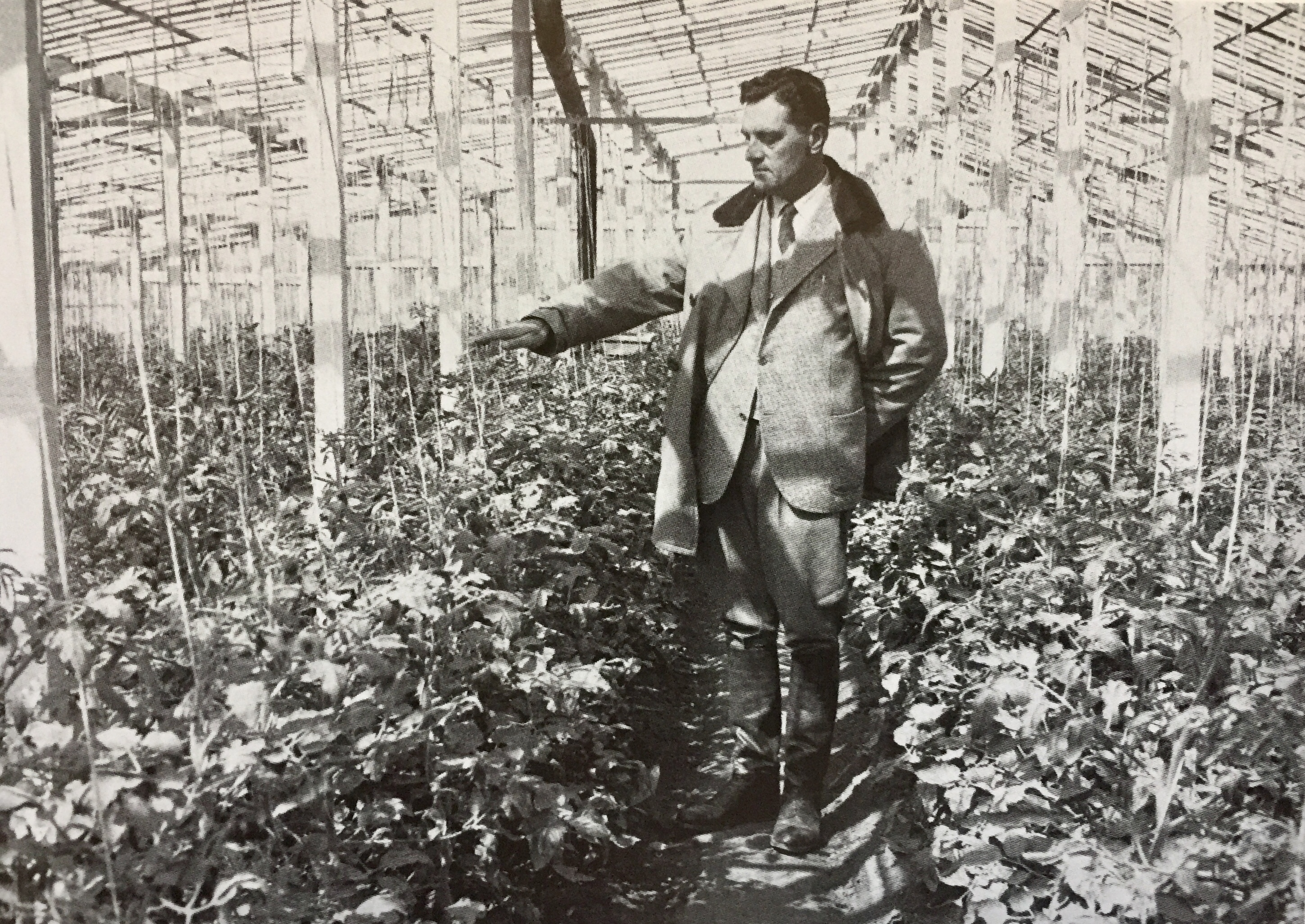 Controllo di colture in serra